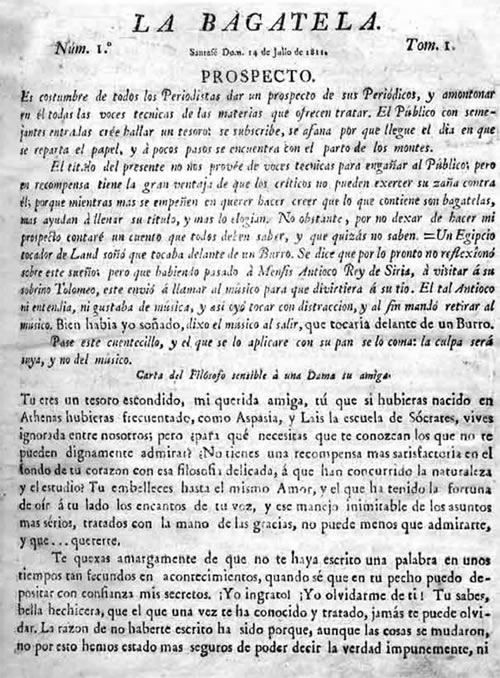 Deuxième de couverture du journal "La Bagatela" paru le 14/07/1811.